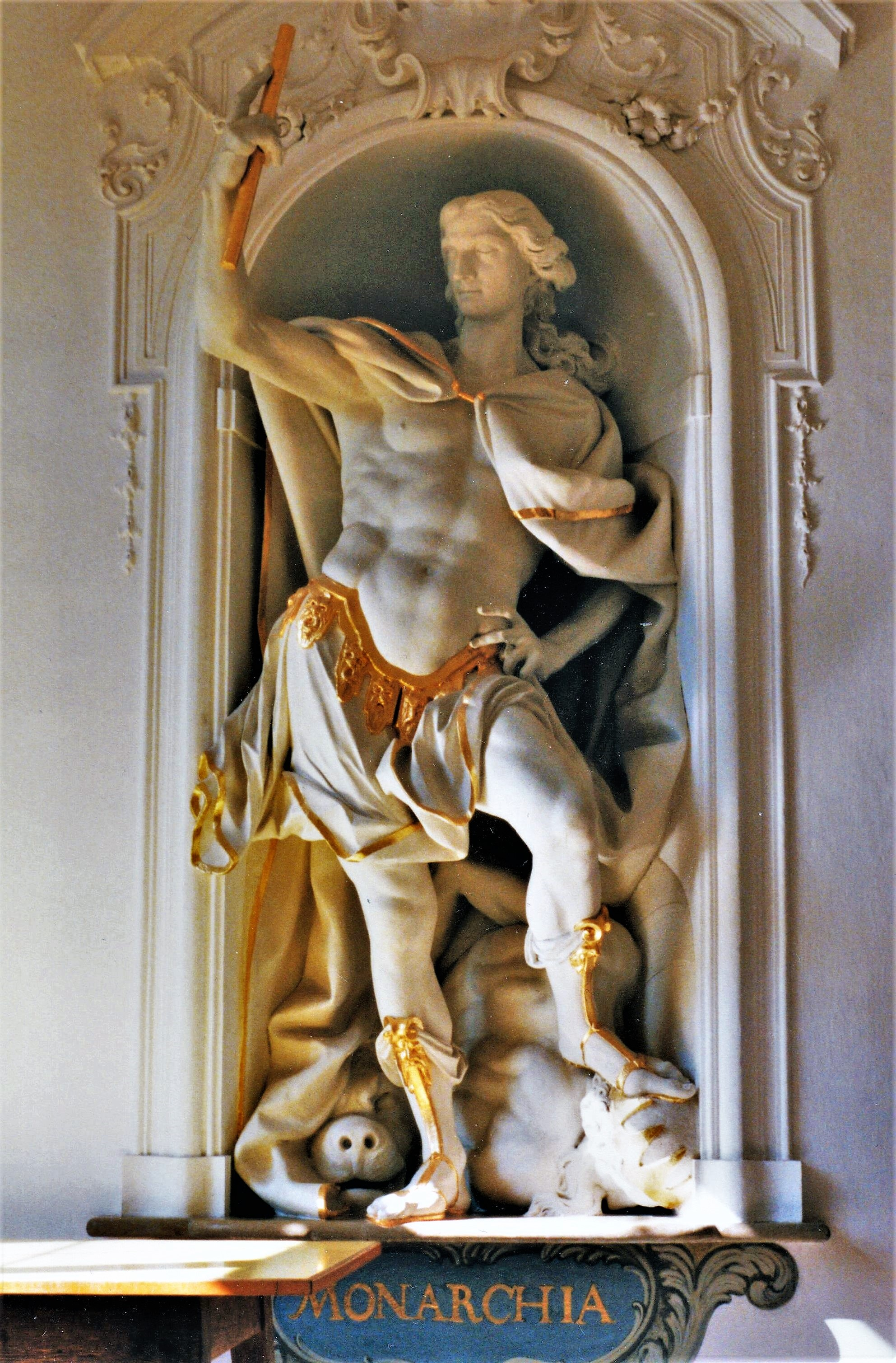 Kloster Ottobeuren, Vorsaal des Kaisersaals, Allegorien der Tugenden Josefs, des Sohnes von Jakob (1727/28) - Monarchia (Alleinherrschaft)